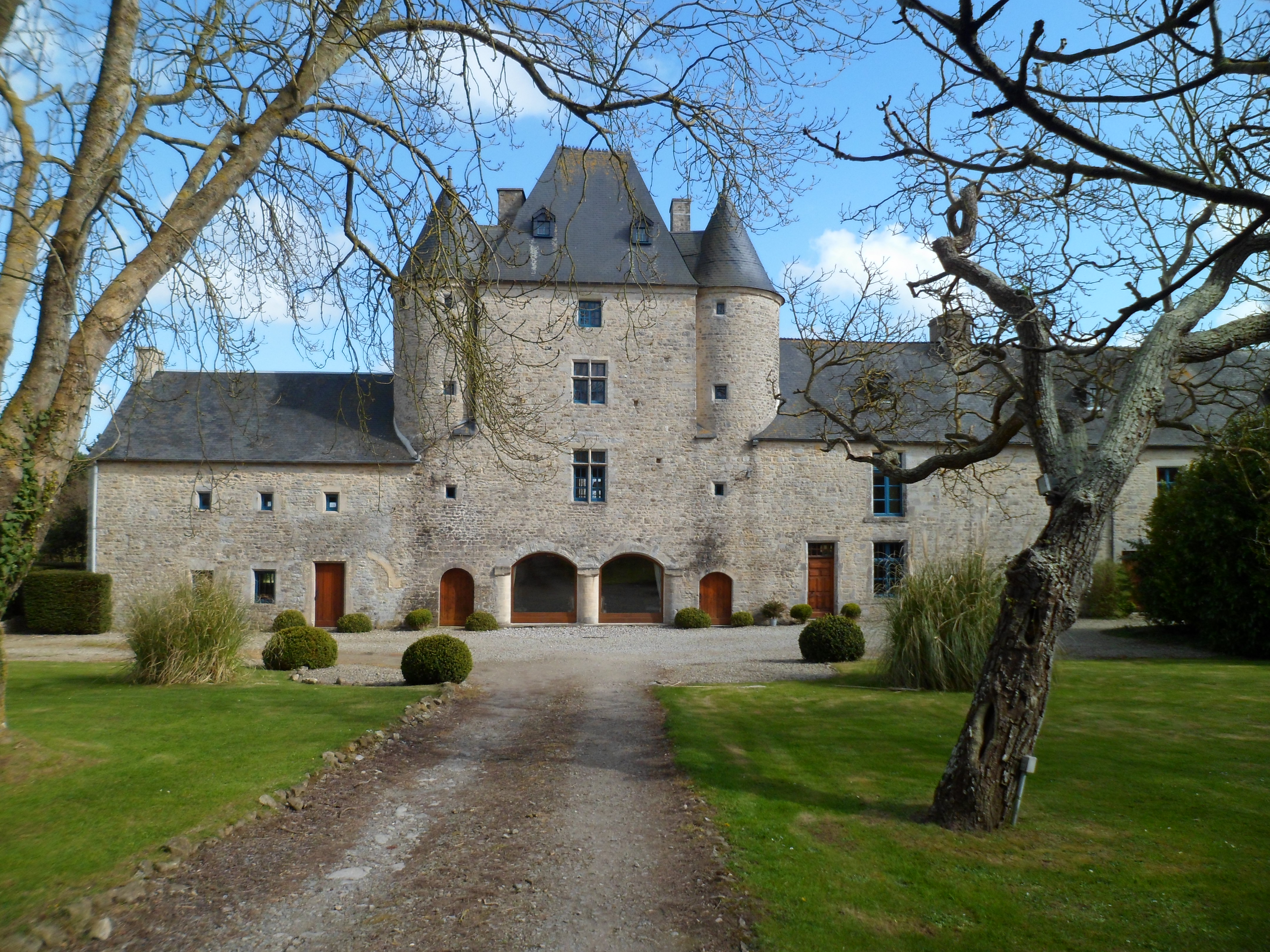 Ancien château de Sainte-Marie-du-Mont .